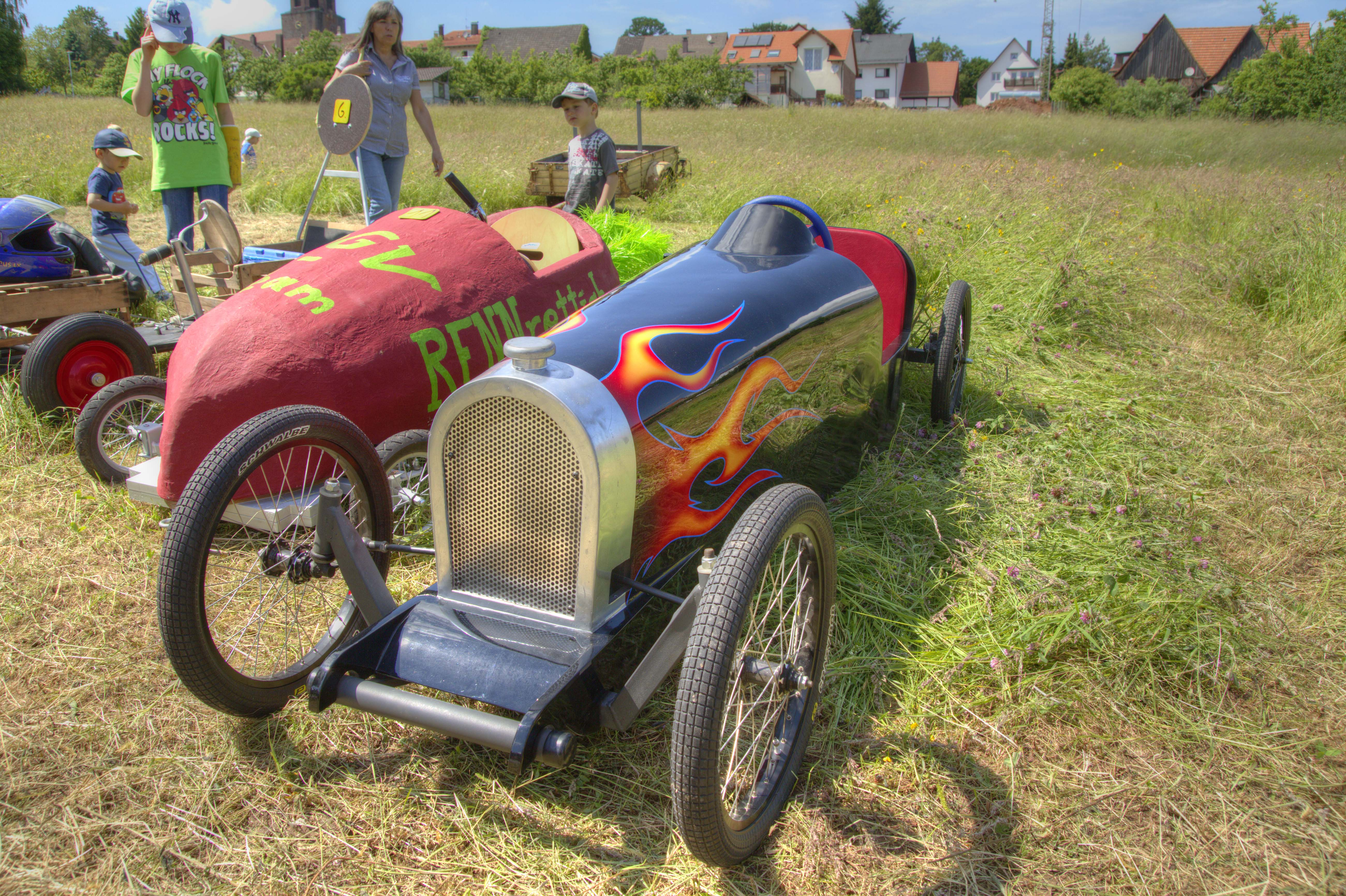 Eine Seifenkiste beim Völkersbacher Brunnenfest, einem Teilort von Malsch.